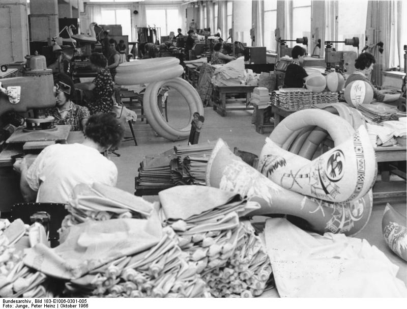 Dresden, halbstaatlicher Betrieb Plastolit Zentralbild/Junge, 14.10.66 DDR: "Plastolit" in Dresden-Radebeul - bedeutender halbstaatlicher Betrieb - Exporteur von Wasserspielzeug Der 1950 mit 18 Angestellten als privates Unternehmen geschaffenen Betrieb für Kunststoff-Verarbeitung "Plastolit" (Horst Meyer) in Dresden-Radebeul, stellte als erster Betrieb in der DDR Kinderspielbälle aus Plaste für den Inlandbedarf her. 1960 nahm der Betrieb die staatliche Beteiligung auf und führte erstmalig in der DDR das Hochfrequenzschweißen von Kunststoffen auf PVC-Folienbasis ein. "Plastolit" arbeitet heute mit 200 Beschäftigten vorwiegend für den Export. 90% der Wasserspielwaren (Bälle, Wassertiere jeder Art, Schwimmatratzen, aufblasbare Bäder und Wannen für Kinder) werden in 83 Länder exportiert. Der auf vielen Messen und Ausstellungen vertretene halbstaatliche Betrieb der DDR bietet unter den europäischen Betrieben seiner Art das umfangreichste Sortiment an Wasserspielwaren an, die von der Firma selbst entwickelt werden. Bis 1970 ist die Steigerung der Produktion von Wasserspielwaren um 40% vorgesehen. UBz: Blick in eine Produktionshalle; in der an Hochfrequenzschweißanlagen gearbeitet wird. E 1006/301/5N